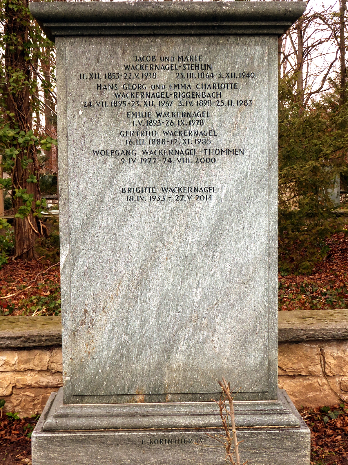 Hans Georg Wackernagel-Riggenbach (1895–1967) Dr.phil.,ao. Prof. für Hist. Hilfswissenschaften und Volkskunde des MA an der Univ. Basel, Träger des Wissenschaftspreises der Stadt Basel, Familiengrab auf dem Friedhof Hörnli, Riehen, Basel-Stadt